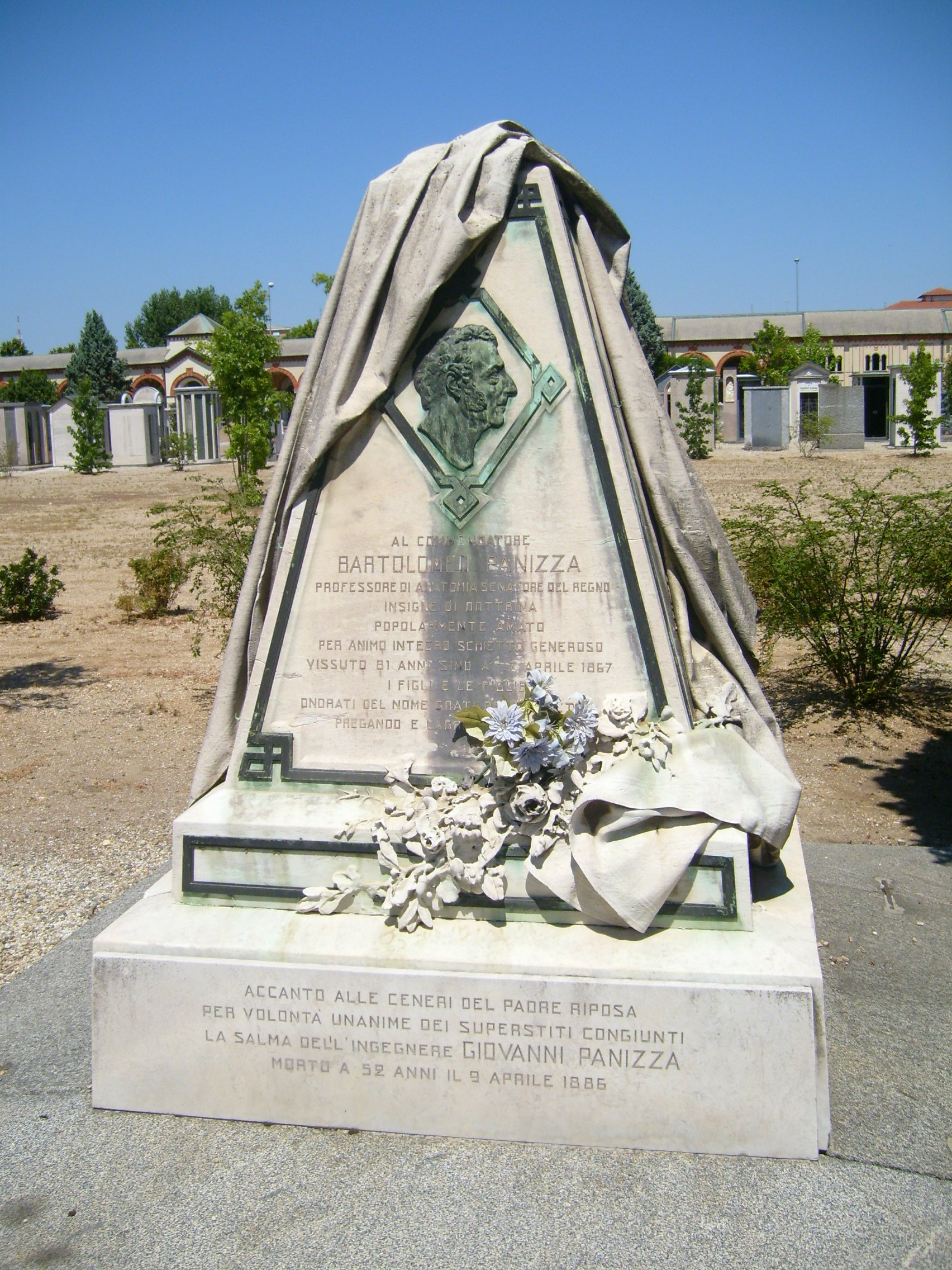 Bartolomeo Panizza’s tomb, Cimitero Monumentale, Pavia, Italy